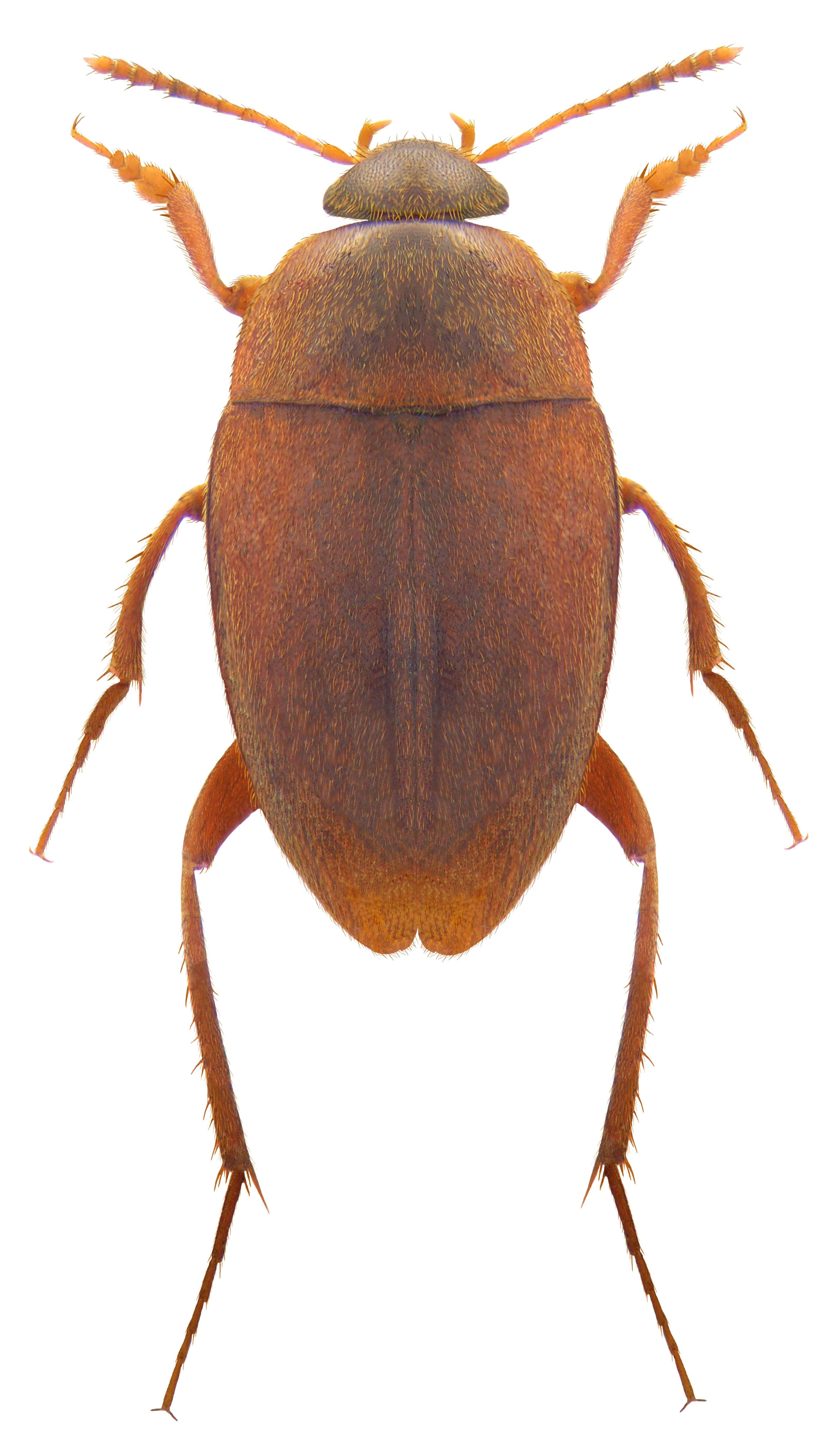 Familie: Cholevidae Groesse: 4,5 mm Verbreitung: Westeuropa Fundort: England, Kent leg. S.A.Williams, 1993; det. J.Cooter Photo: U.Schmidt, 2009